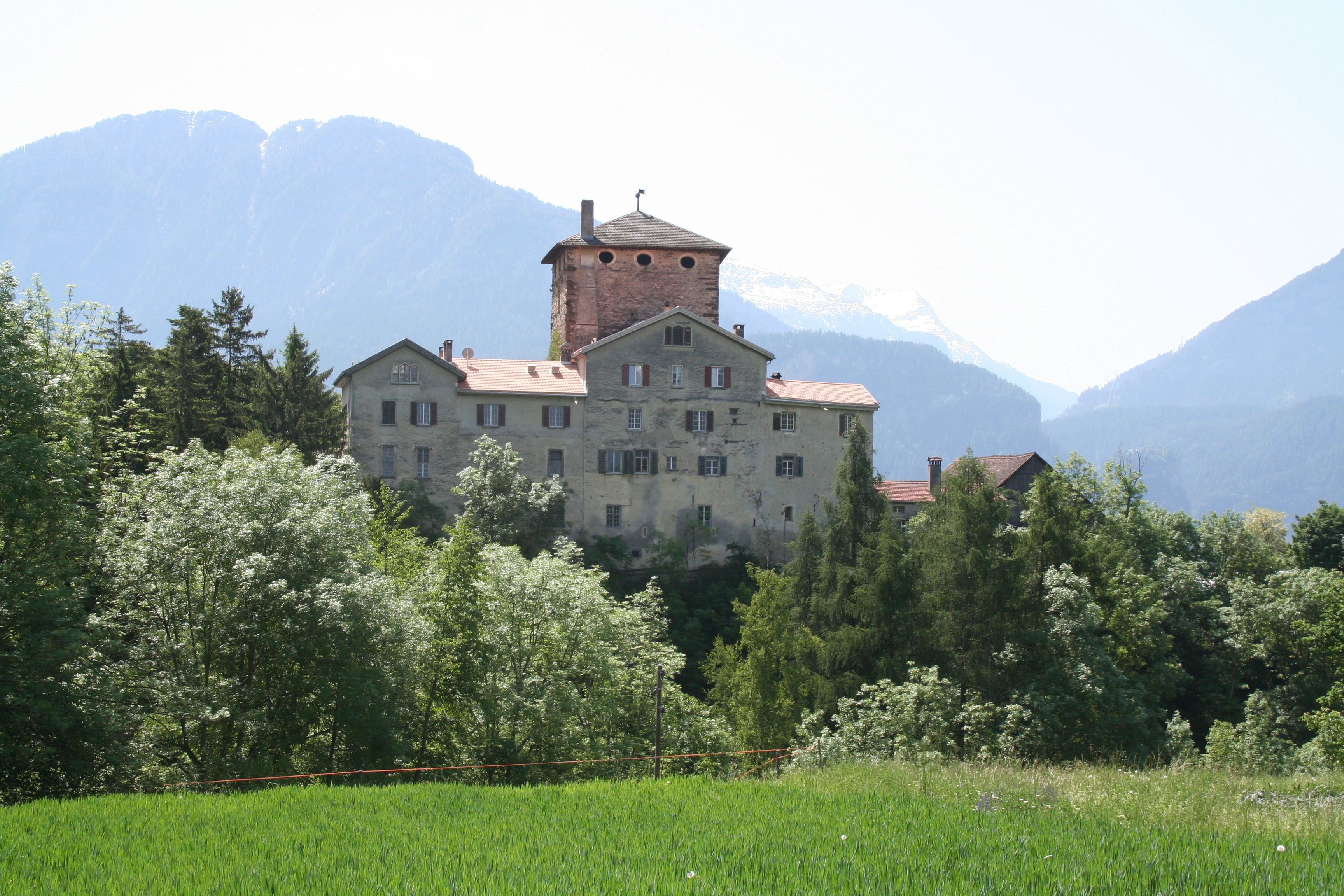 {Schloss Rietberg: Ansicht von Nordwesten